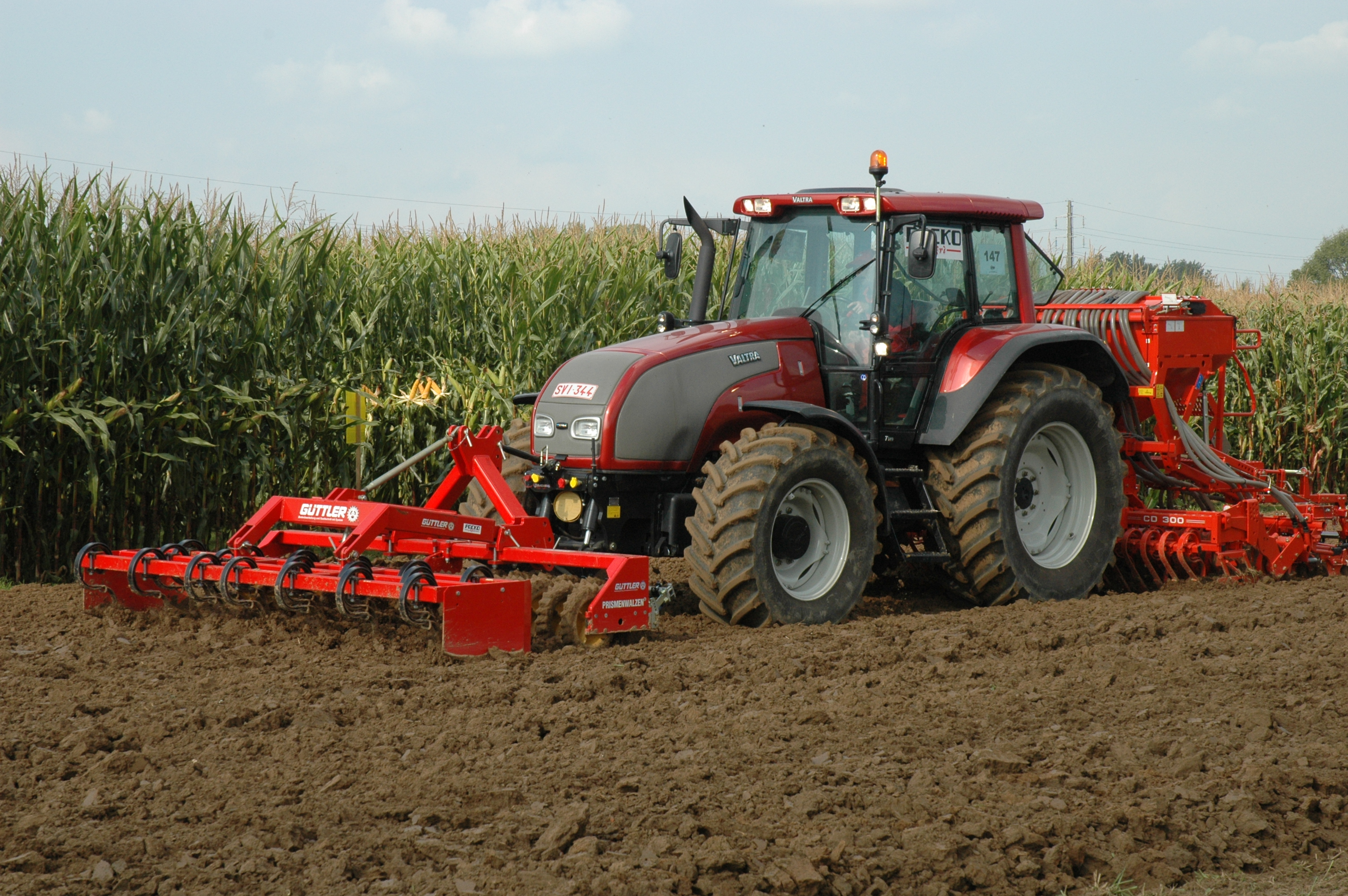 Güttler-Frontgerät zur Saatbettbereitung (Duplex-Prismenwalze mit Zinkenvorsatz) vor Valtra-Traktor T140 (?) mit pneumatischer Drillmaschine von Kuhn (inkl. Kurzkombination CD 300)